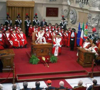 Cerimonia di apertura dell'anno giudiziario presso la Corte di Cassazione